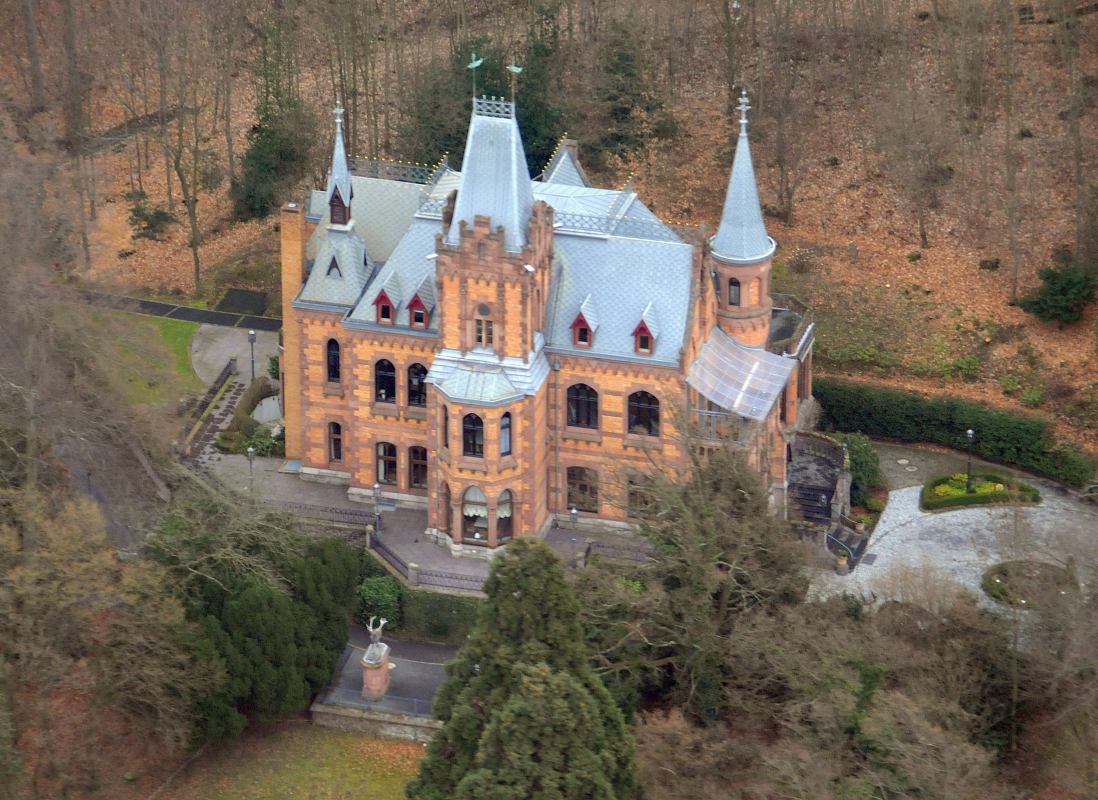 Luftbild der sogenannten Hirschburg in Königswinter